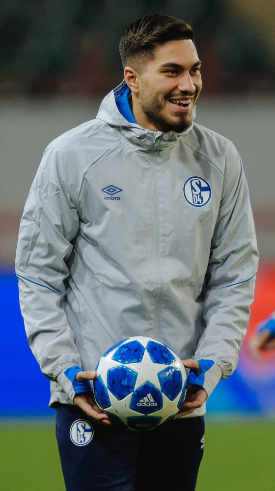 «Шальке» провел тренировку перед матчем с «Локомотивом»